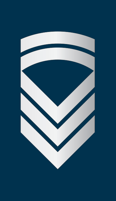 OR7 NOR - Stabssersjant Luft